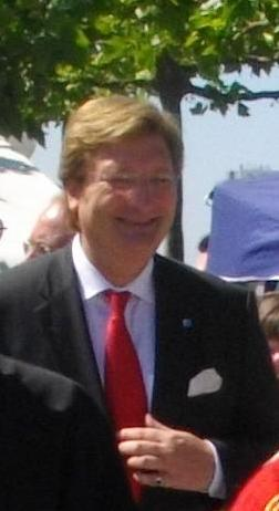 Oberbürgermeister Dirk Elbers (Ausschnitt)